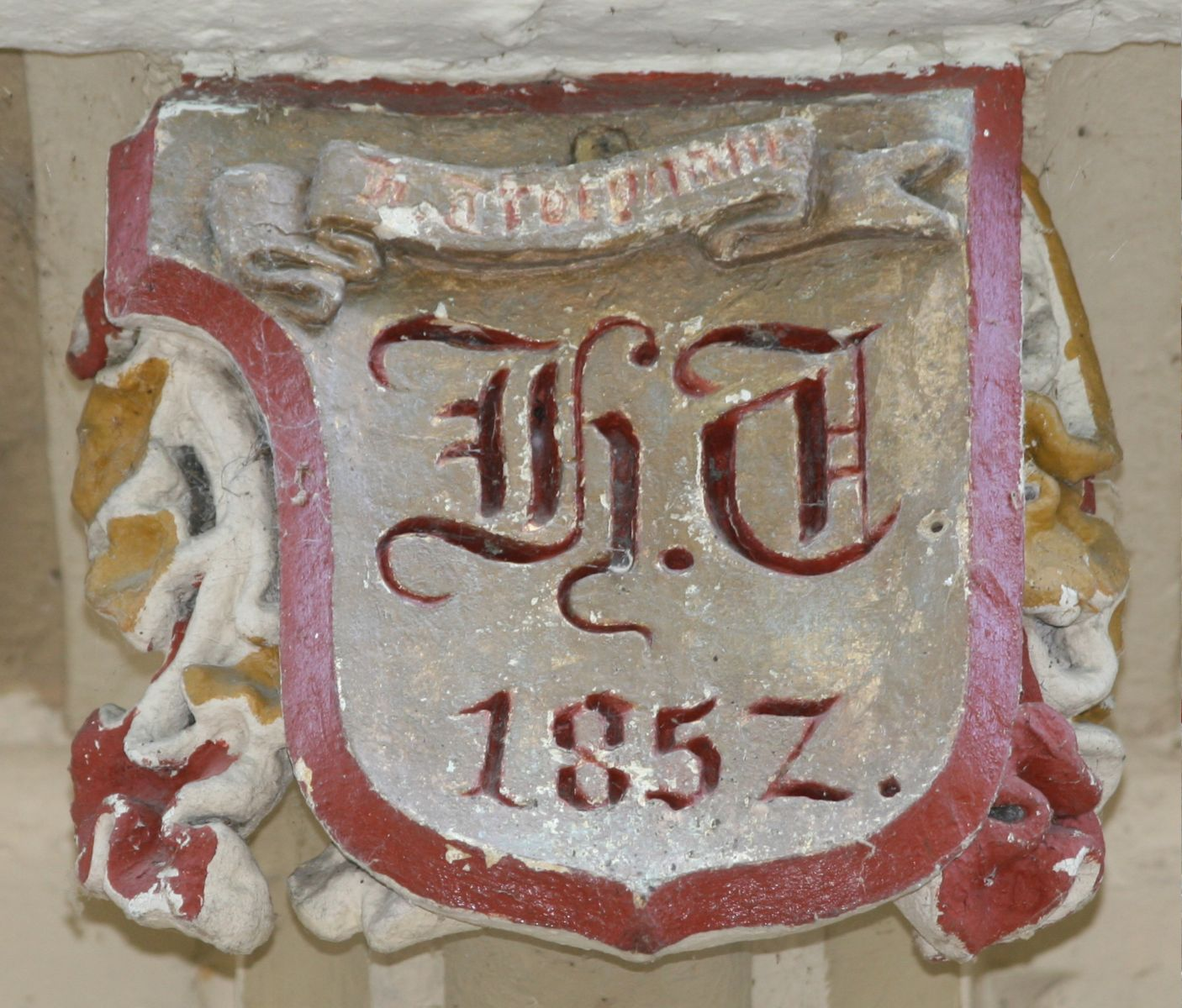 Sujet: Dem Hippolyte Trotyanne säin Numm, seng Initialien an d'Joereszuel vun der Erëffnung iwert der Entréesdir vum Hotel du Grand-Chef zu Munneref. Kategorie:Gemeng Munneref